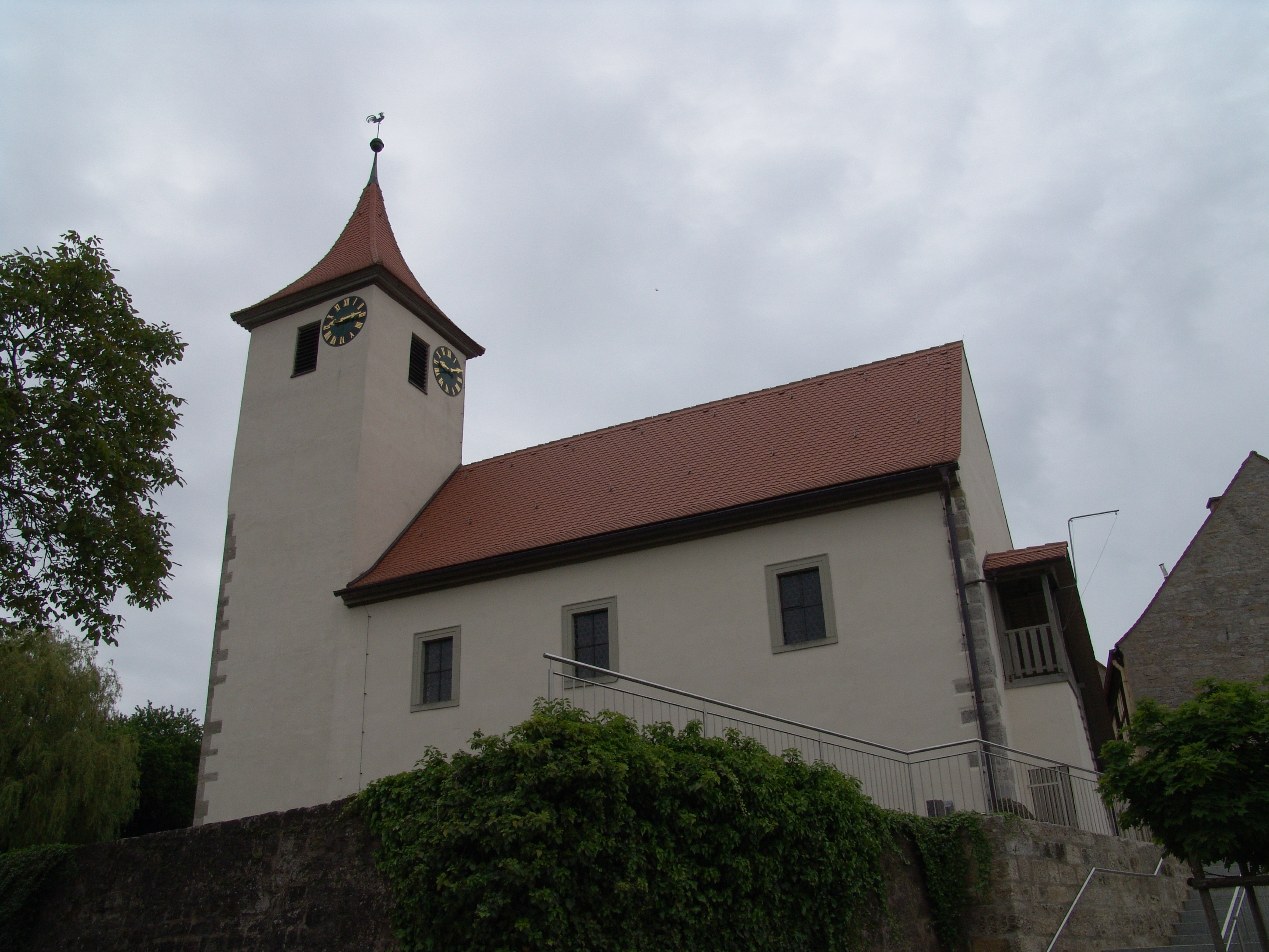 evang.-luth Kirche St. Nikolaus in Adelshofen